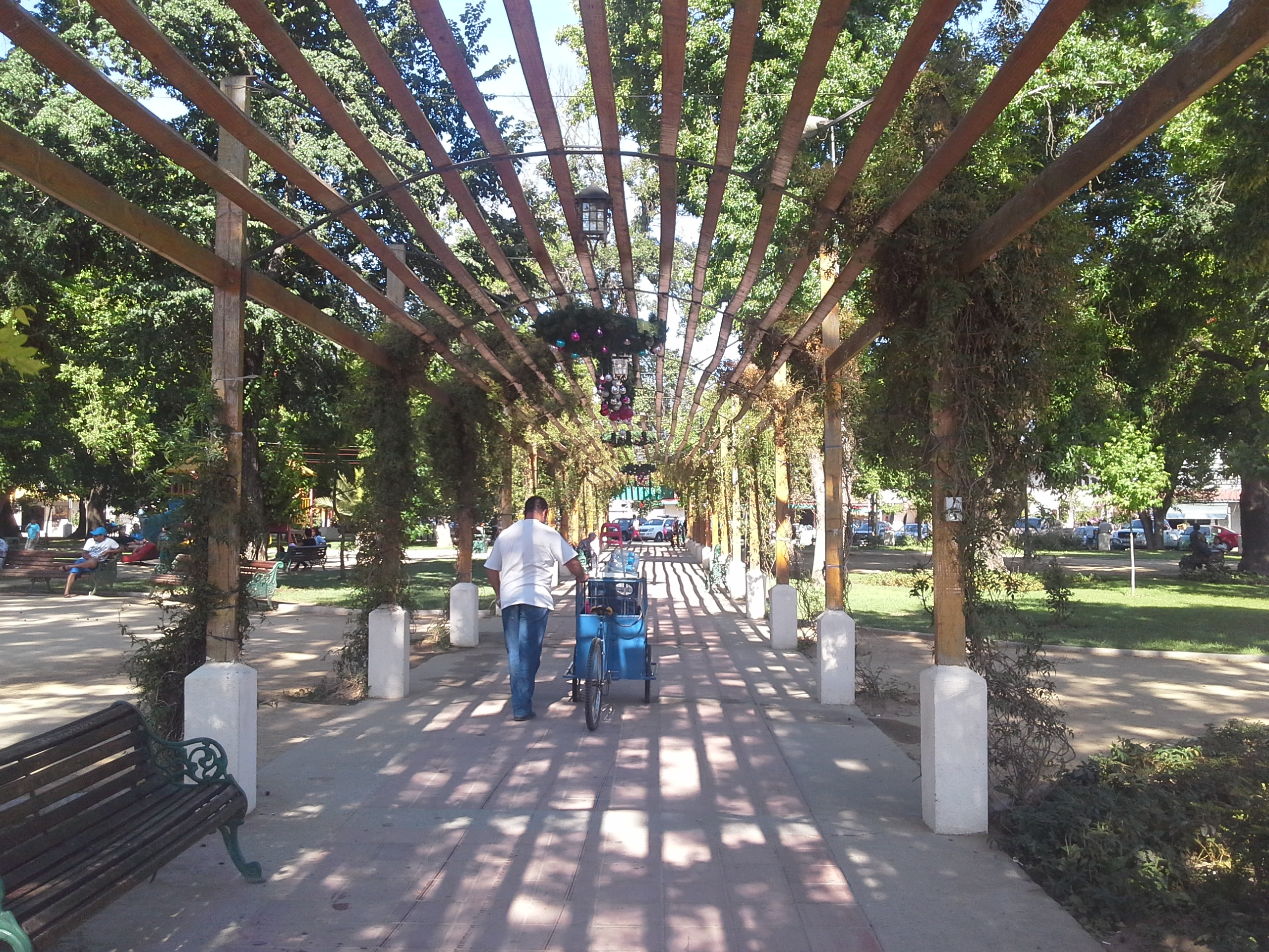 Plaza de Armas de Las Cabras con el diseño actual